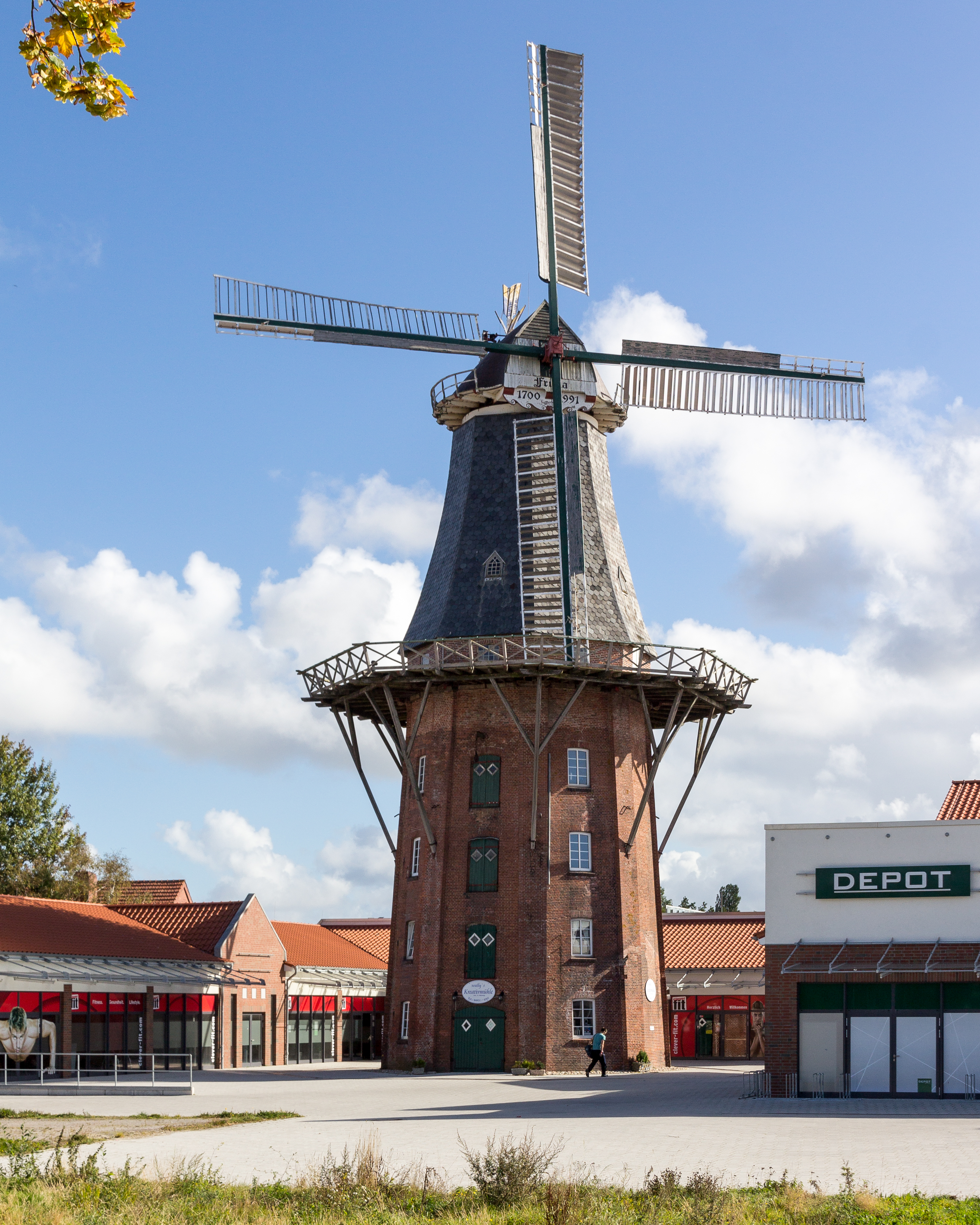 Frisia-Mühle in Norden (Ostfriesland)